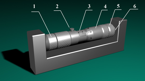 рис. 1 Нутромер (штихмас)